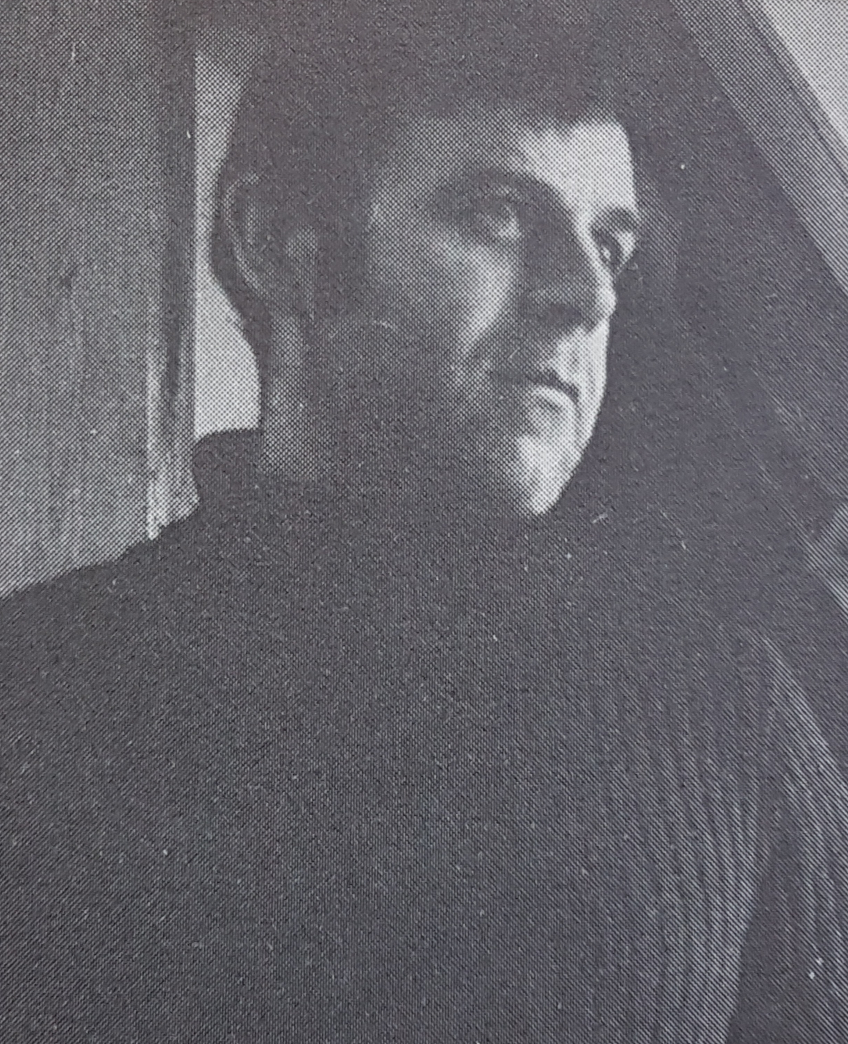 Jörgen Zetterquist Artist from Sweden